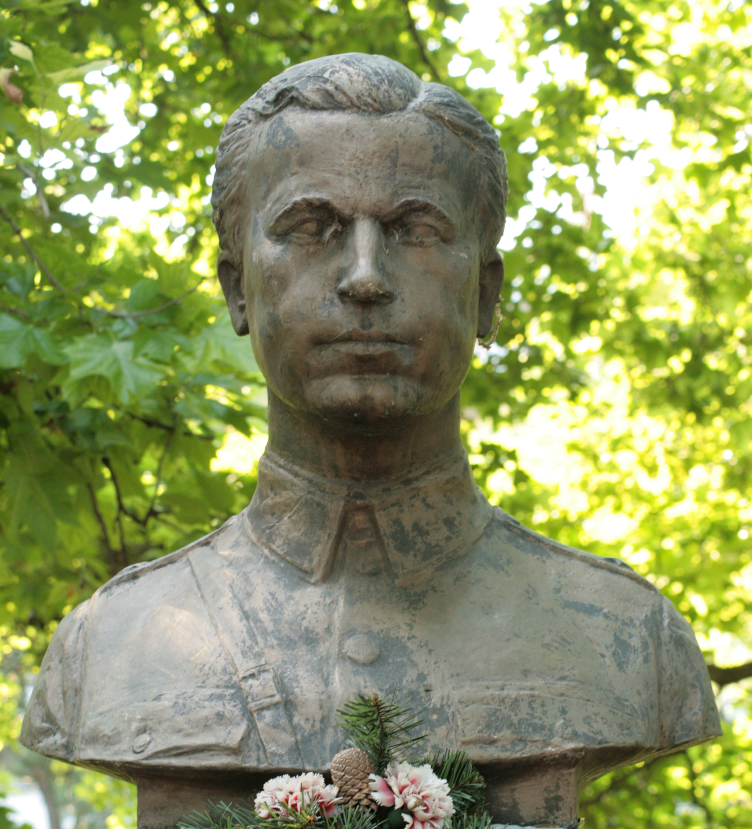 Busta Ľudovíta Kukorelliho na Svätoplukovej ulici v Bratislave